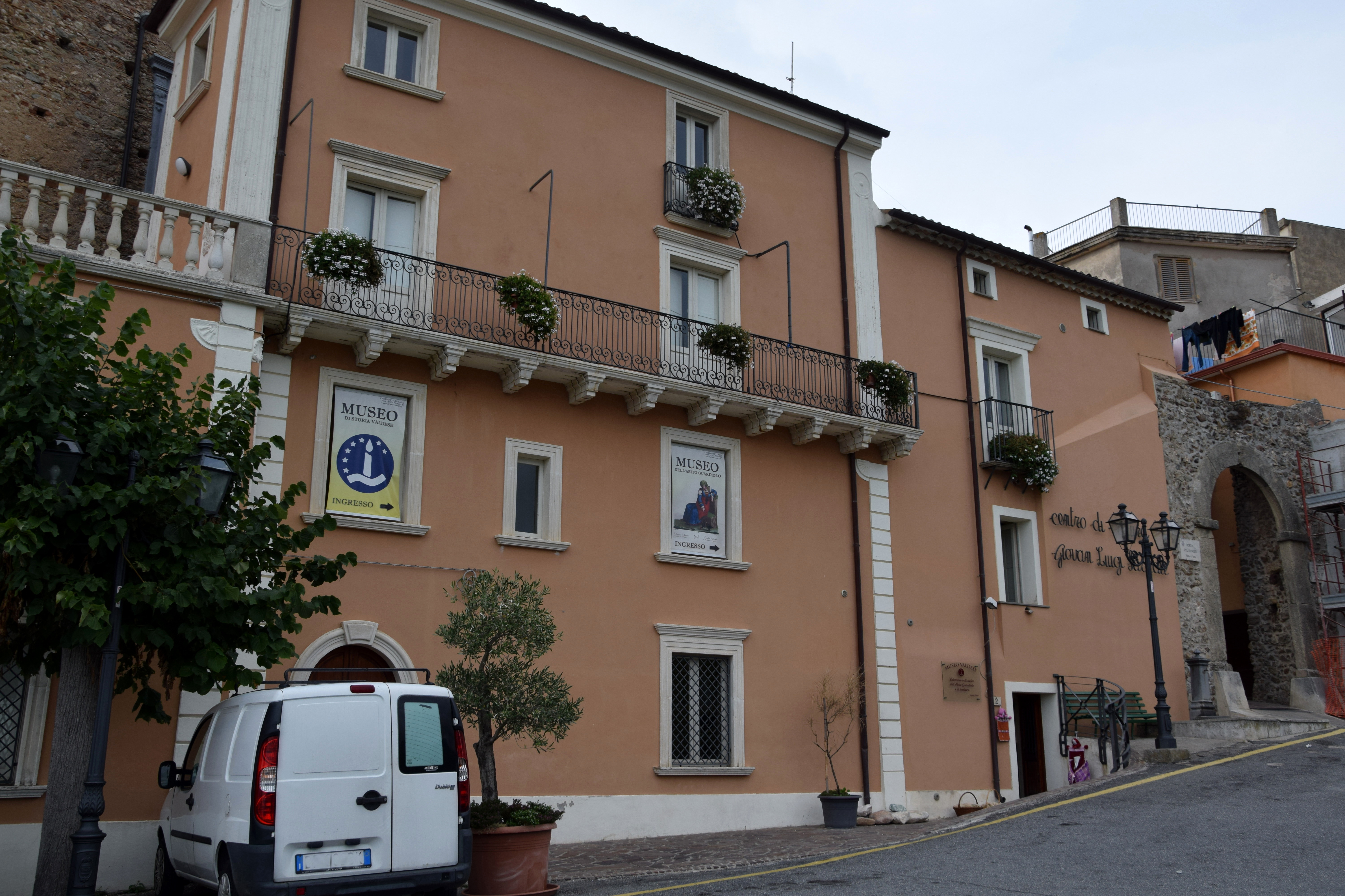 Centro di Cultura Giovan Luigi Pascale This is a photo of a monument which is part of cultural heritage of Italy.